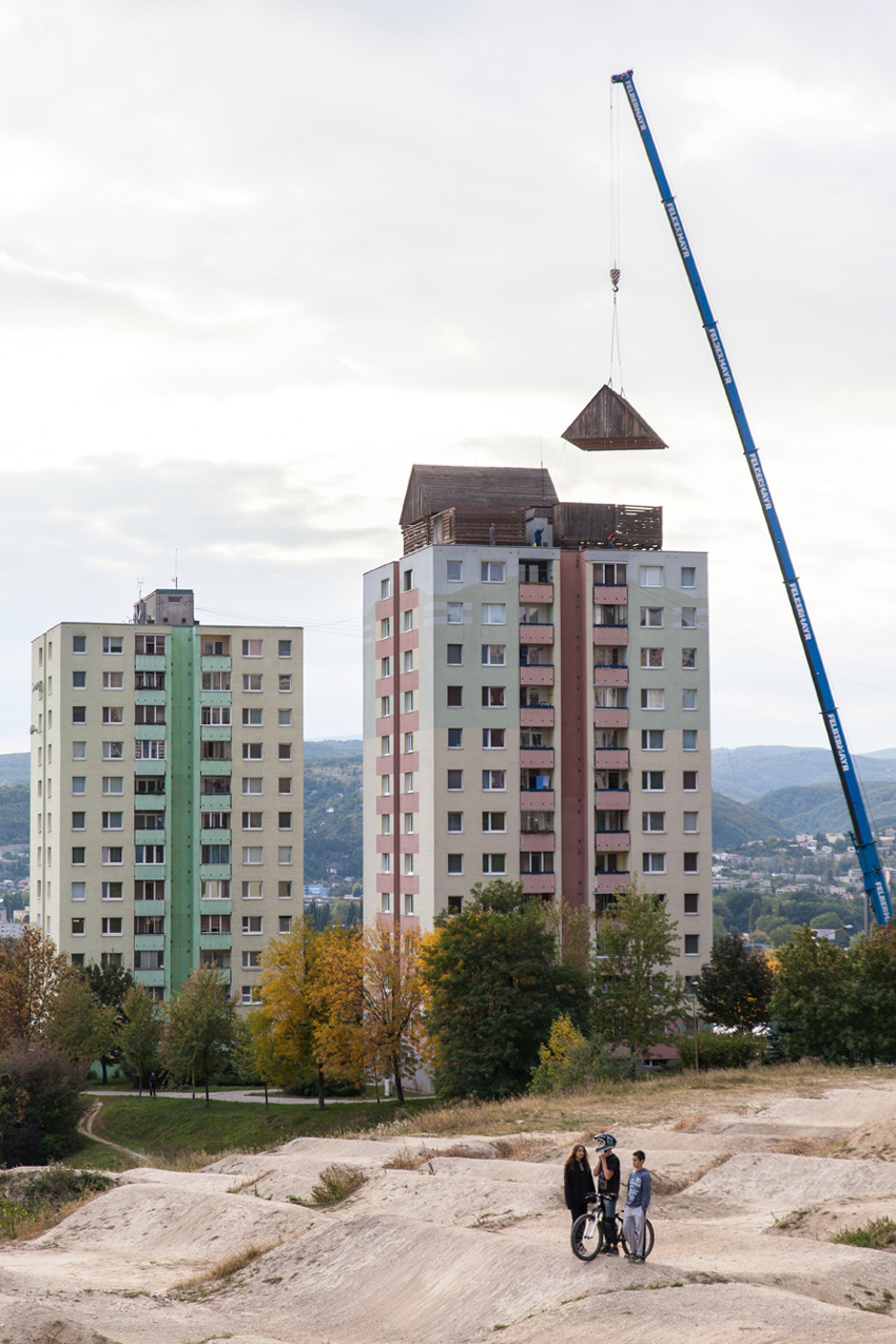 Tomáš Džadoň, Pamätník ľudovej architektúry, 2013- 2016, foto: Dominika Jackuliaková